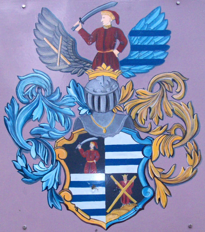 Das Wappen der Herren von Thumbshirn auf einer gemalten Wappentafel for Schloss Ponitz